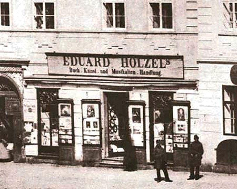 Knihkupectví Eduard Hölzel, Olomouc, Horní náměstí čp. 8